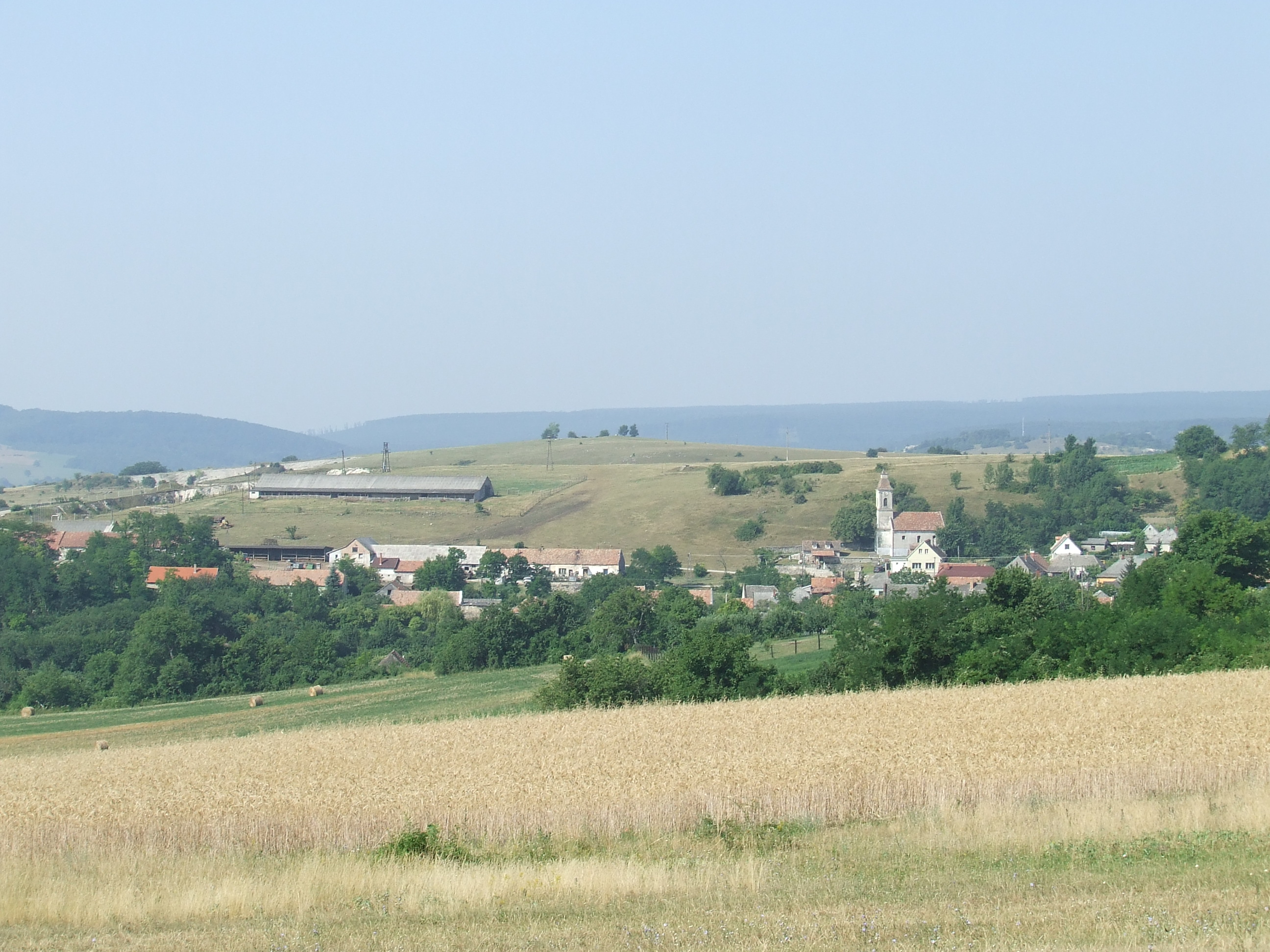 Öcs község déli része